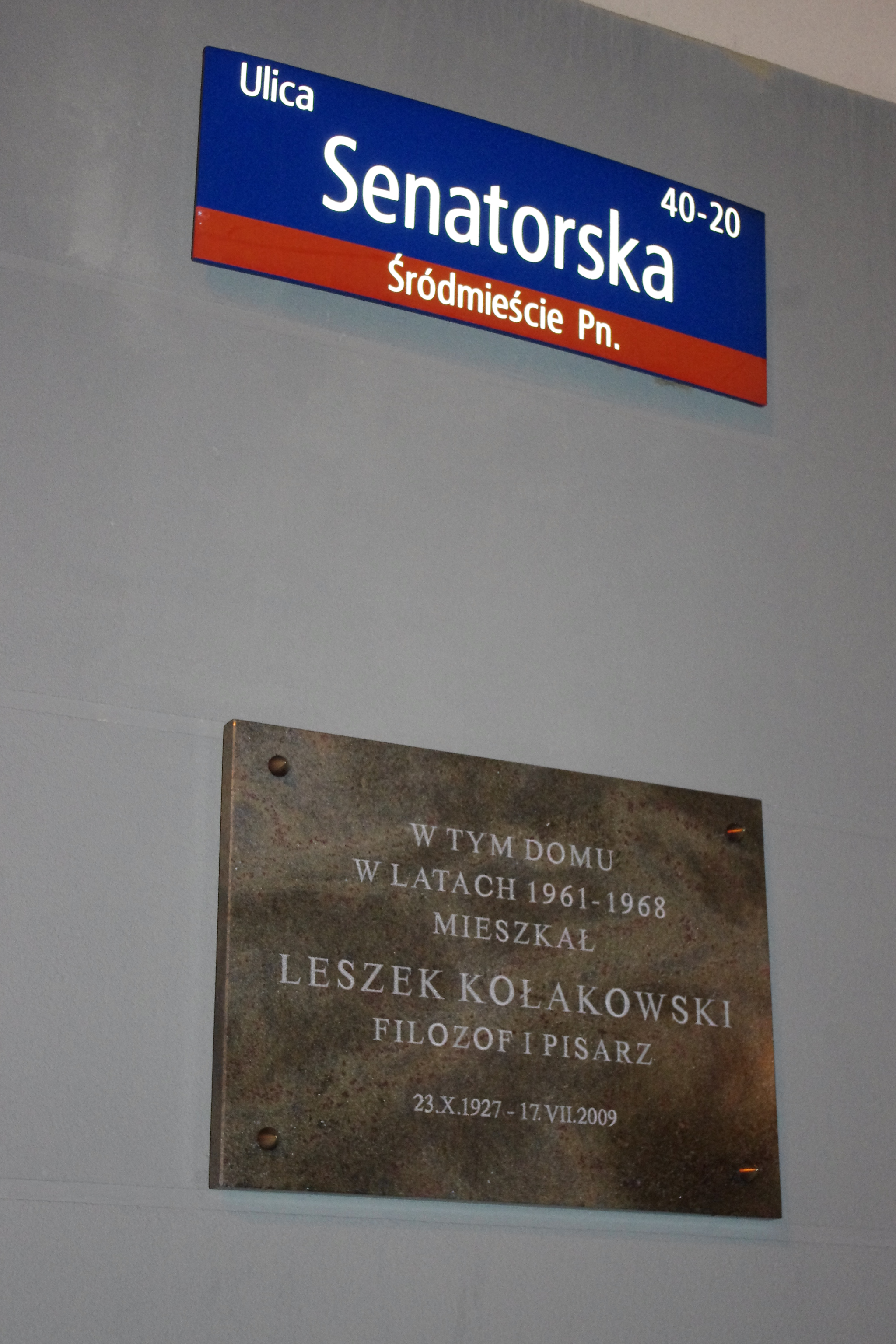 Tablica upamiętniająca Leszka Kołakowskiego na ul. Senatorskiej 40 w Warszawie (róg Placu Bankowego). Tablice odsłonięto w 85 rocznicę urodzin filozofa – 23 października 2012 r.